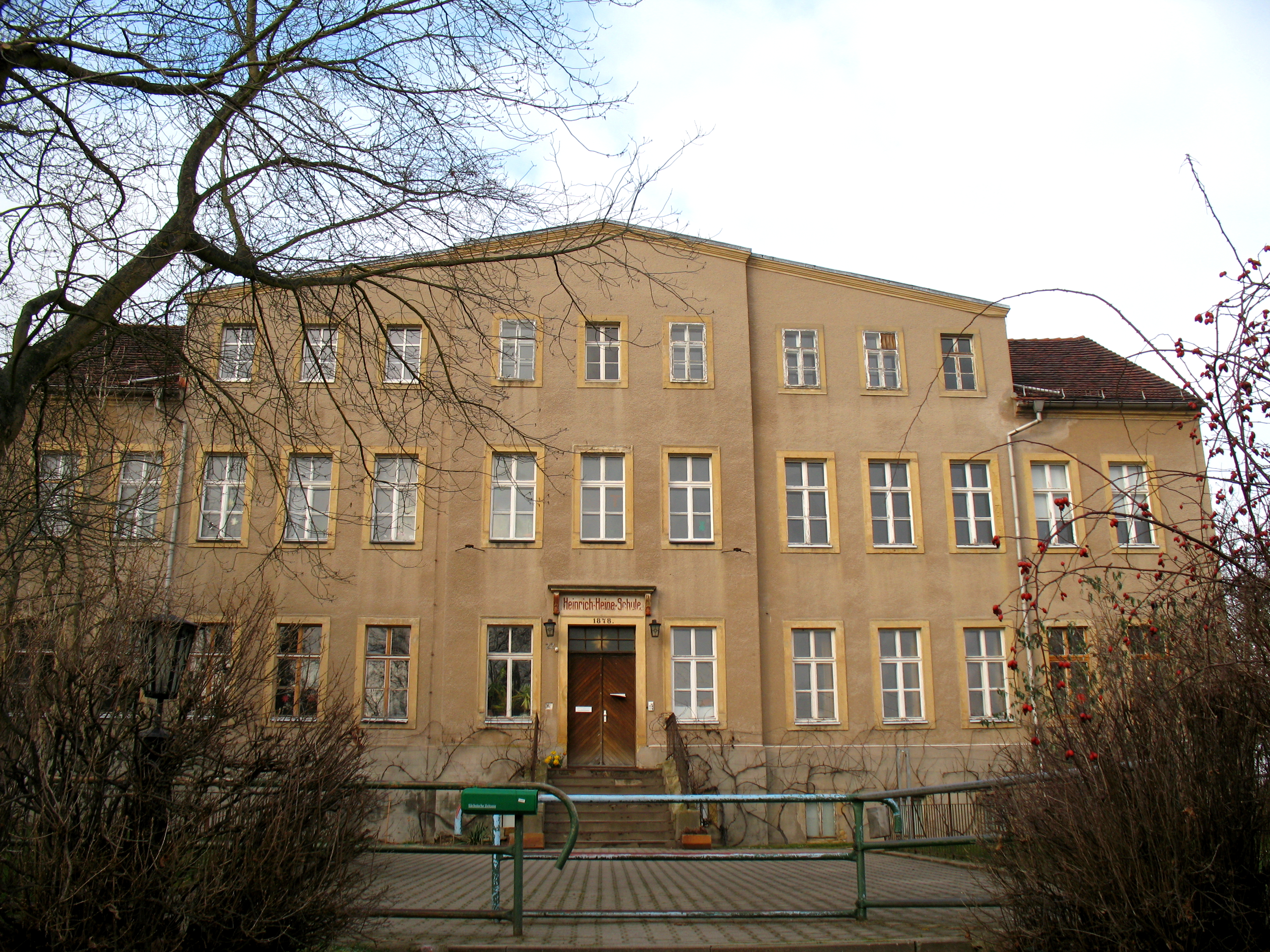 Heinrich-Heine-Schule at Naustadt (Klipphausen)